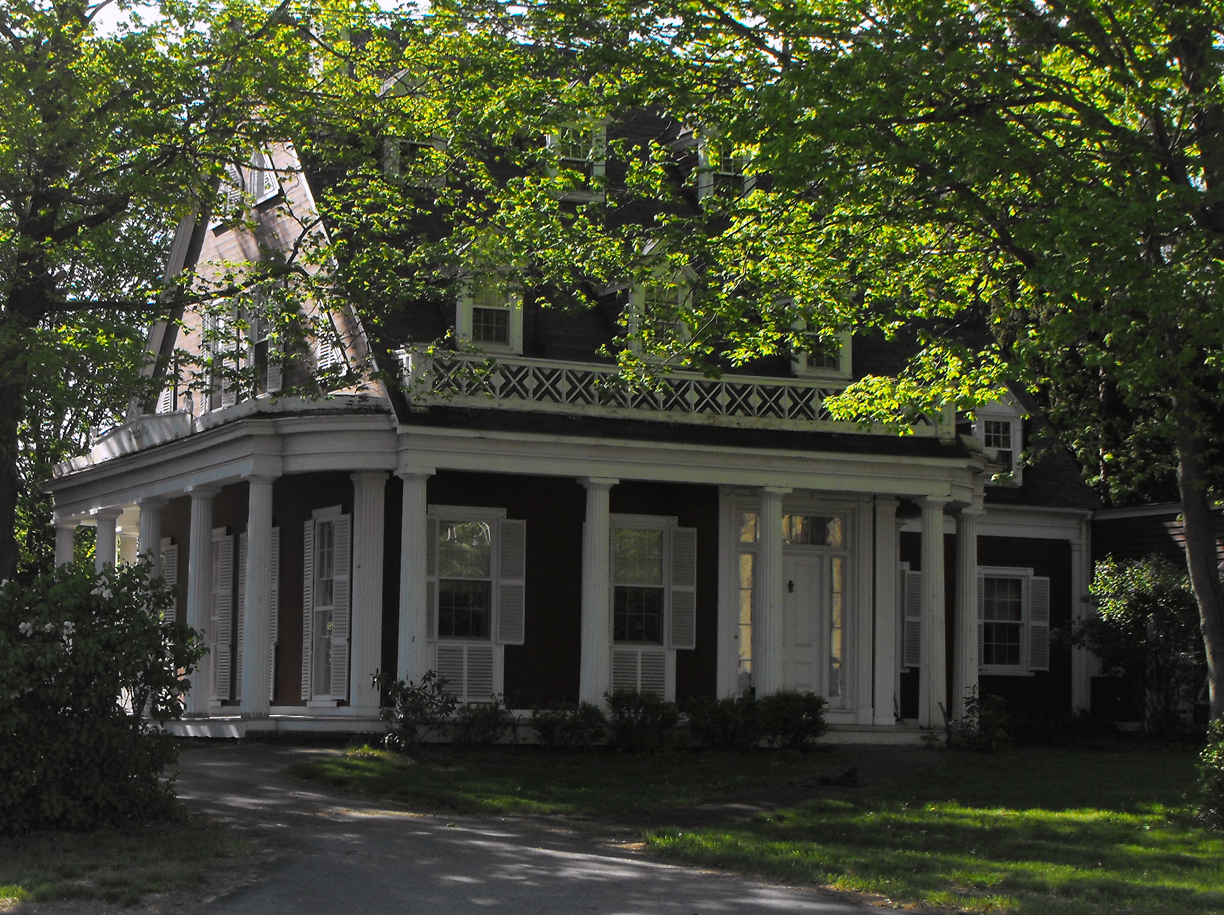 Stephen Barker House 165 Haverhill St. Methuen, MA